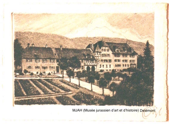 Reproduction d'une ancienne carte postale.